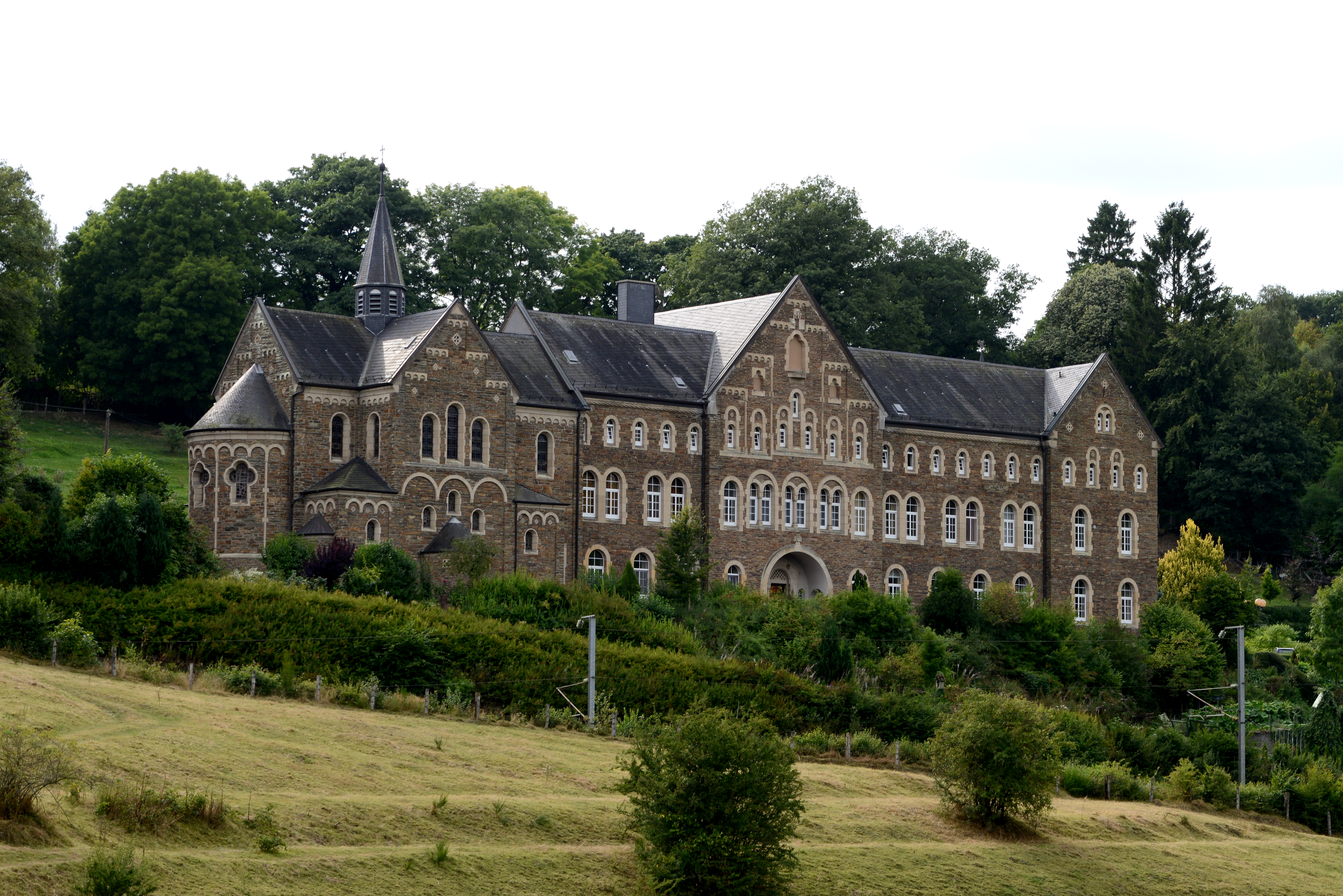 Vue vum Osten, de Klouschter Cinqfontaines op der Pafemillen.